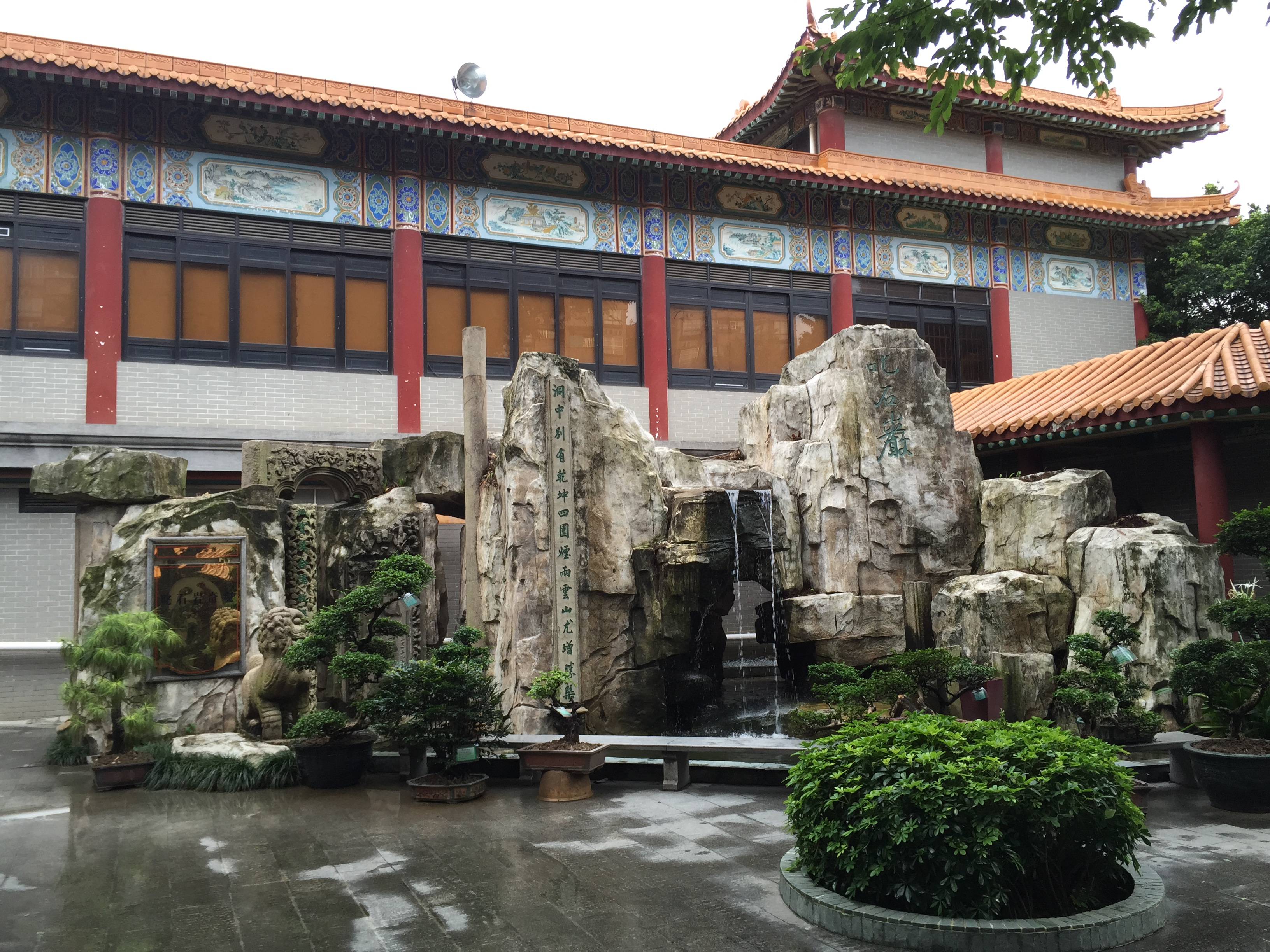 位于广州市荔湾区古祠路1号黄大仙祠内。因抗日战争原黄大仙祠而被毁于一旦。遗迹仅存原建筑门头石刻1方、方石柱对联1根、圆石柱1根、残柱4根。2015年8月，黄大仙祠残存的遗迹被列为广州市第八批文物保护单位